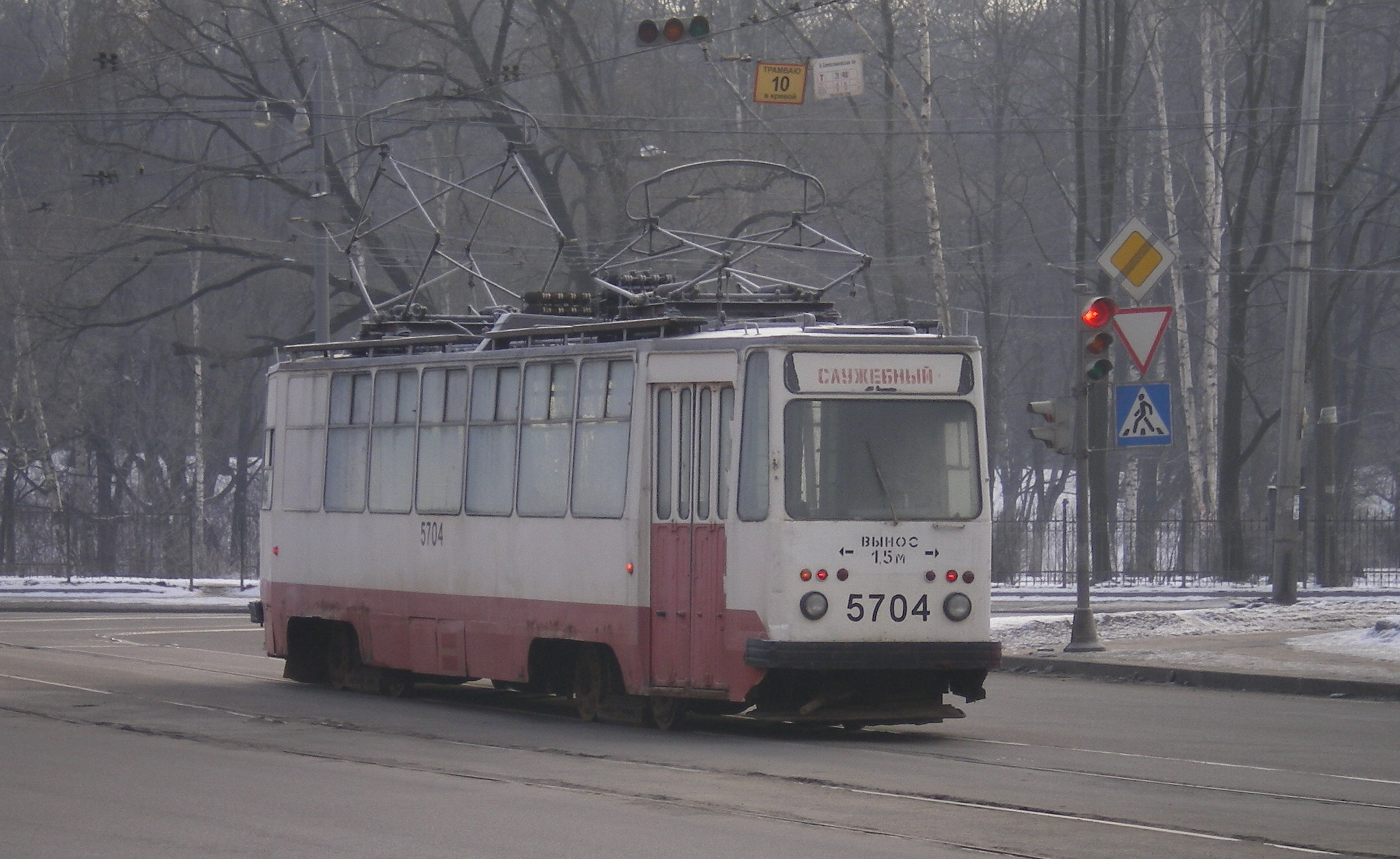 Двухголовый служебный трамвай 5704